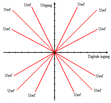 4 kwadrantenvermenigvuldiger. 4 kwadrantenvermenigvuldiger.